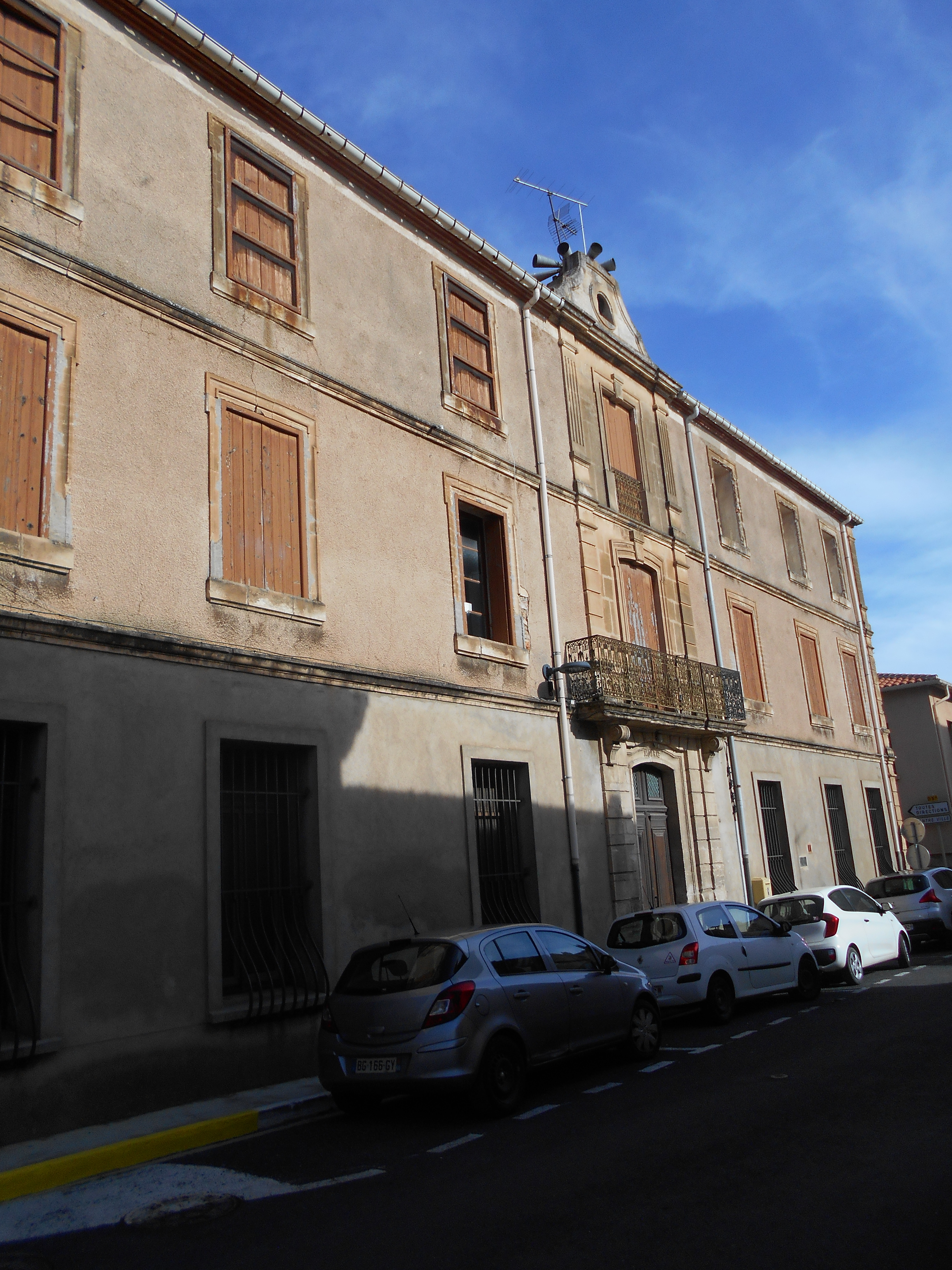 Antiga Casa de la Vila de Salses